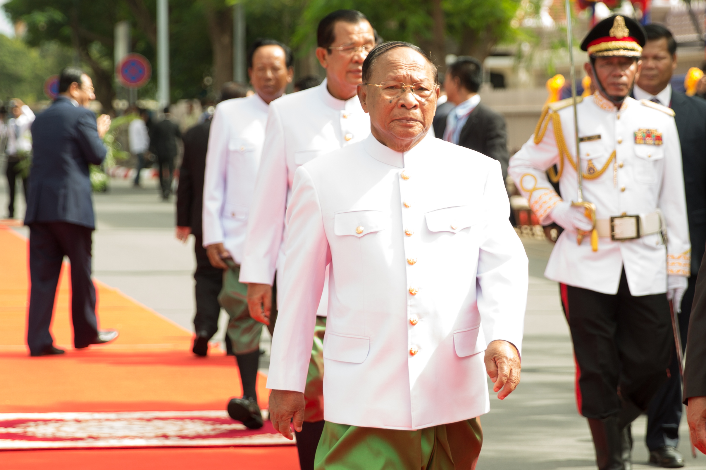 ភាសាខ្មែរ: លោក ហេង សំរិន ប្រធានបណ្តោះអាសន្ននៃរដ្ឋសភា ចូលរួម ក្នុងសម័យប្រជុំពេញអង្គលើកទី១ នីតិកាលទី៦ នៅព្រឹកថ្ងៃពុធទី០៥ កញ្ញា ឆ្នាំ ២០១៨។